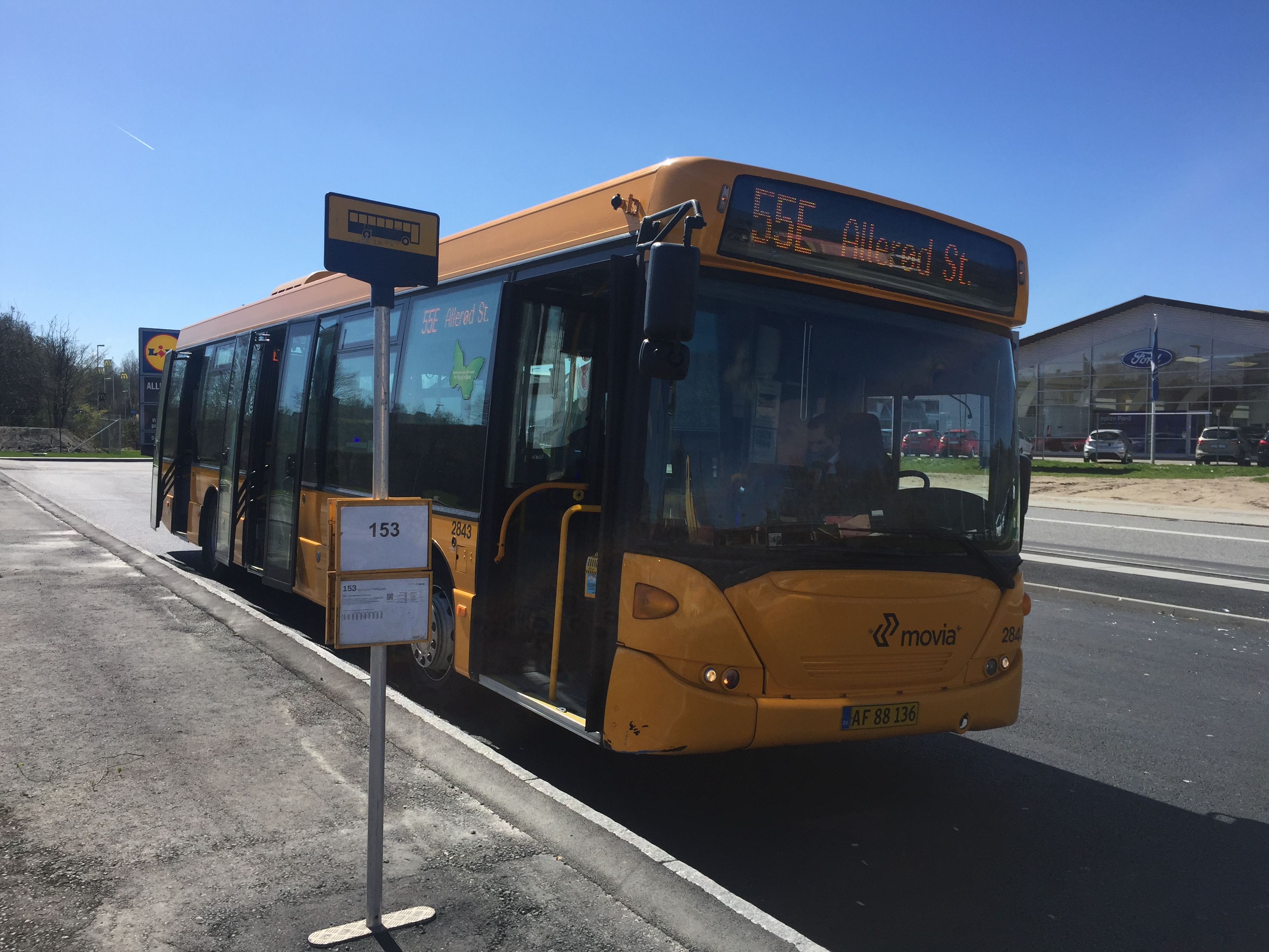 Normal bus uden grønne hjørner på linje 55E. Malmparken station.